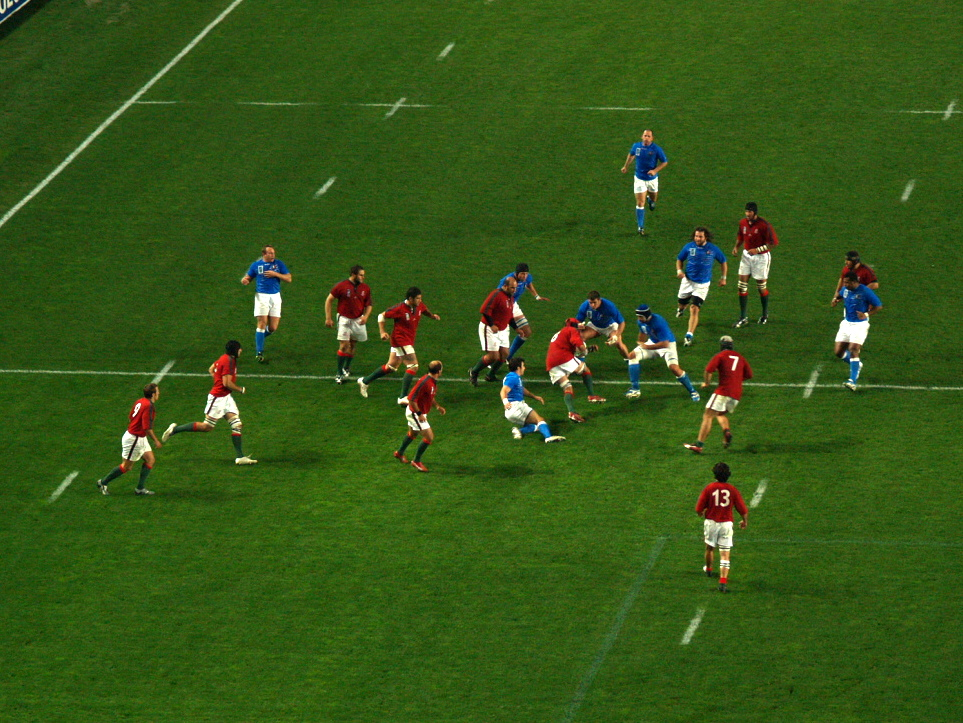 Match Italie contre le Portugal - Coupe du Monde de Rugby 2007